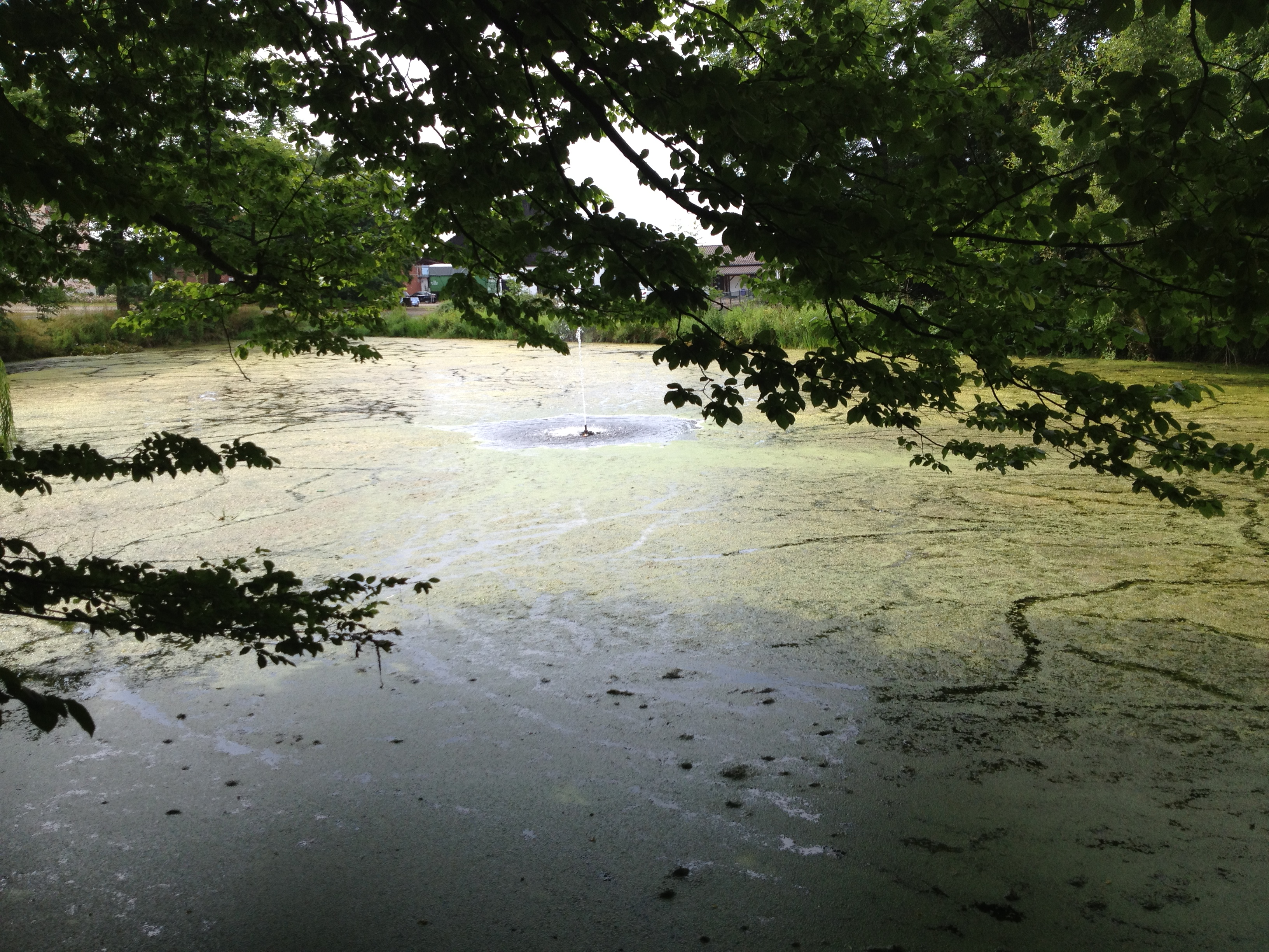 Kassel-Steig nahe Gut Windhausen